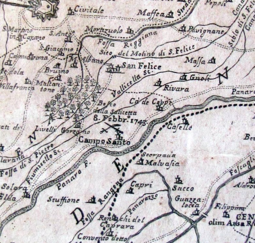 Mappa del territorio modenese del 1746. Particolare sull'indicazione della battaglia di Camposanto dell'8 febbraio 1743